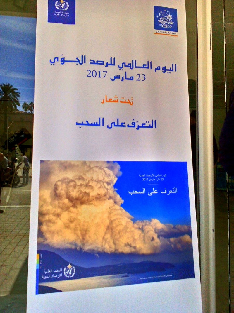 Tunis, Tunisie تونس العاصمة ، تونس